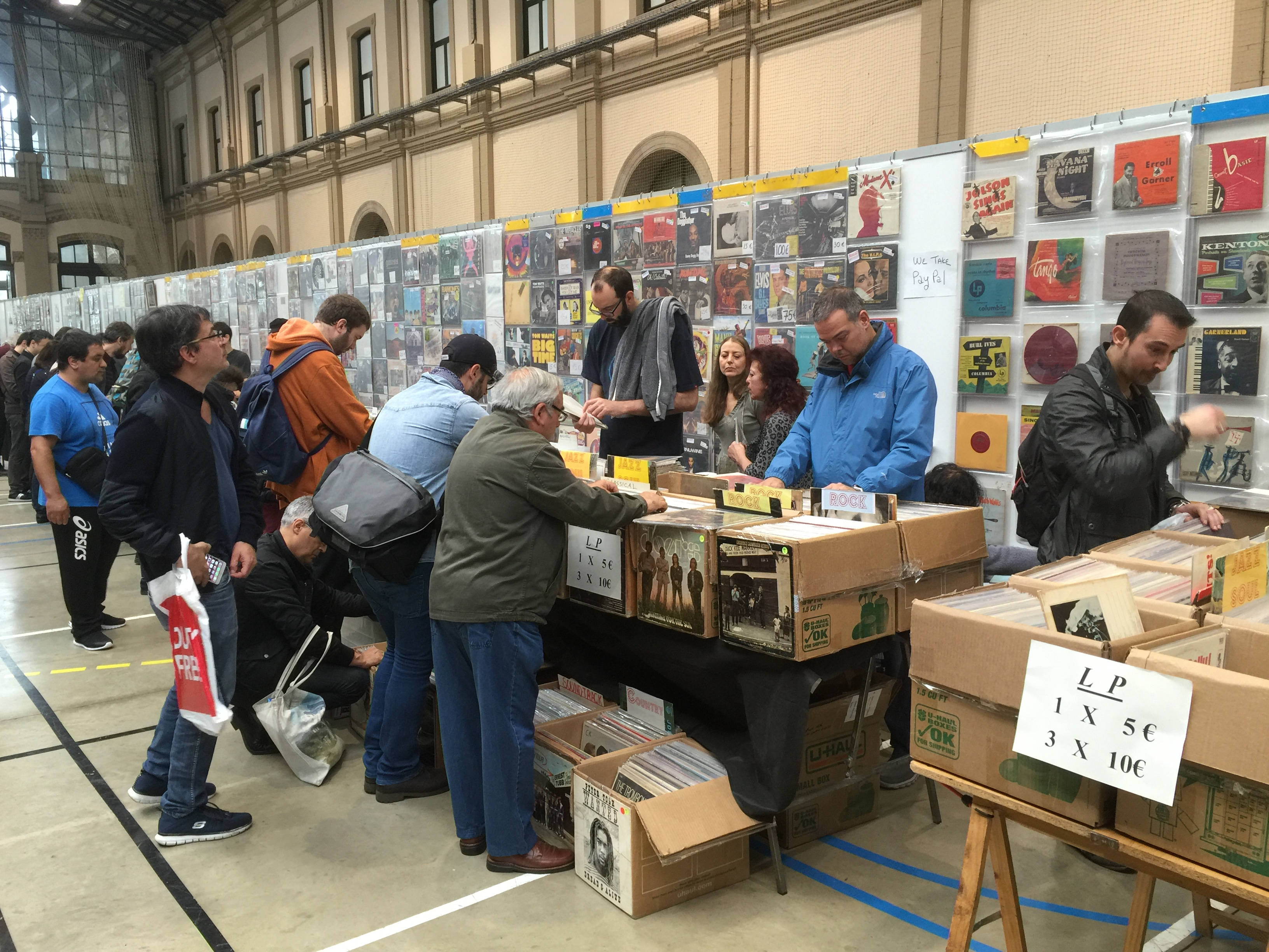 Imágenes captadas durante la Feria del Coleccionista Discográfico realizada en Barcelona el 30 de Abril y el 1 de Mayo de 2016